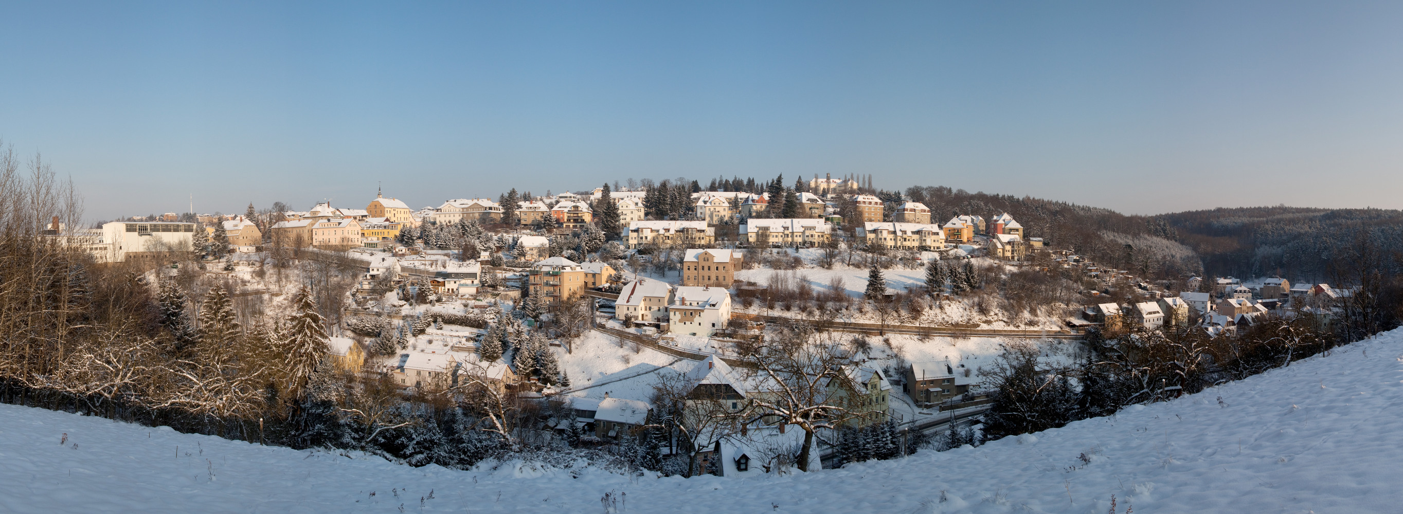 Stadtansicht Rabenau im Winter